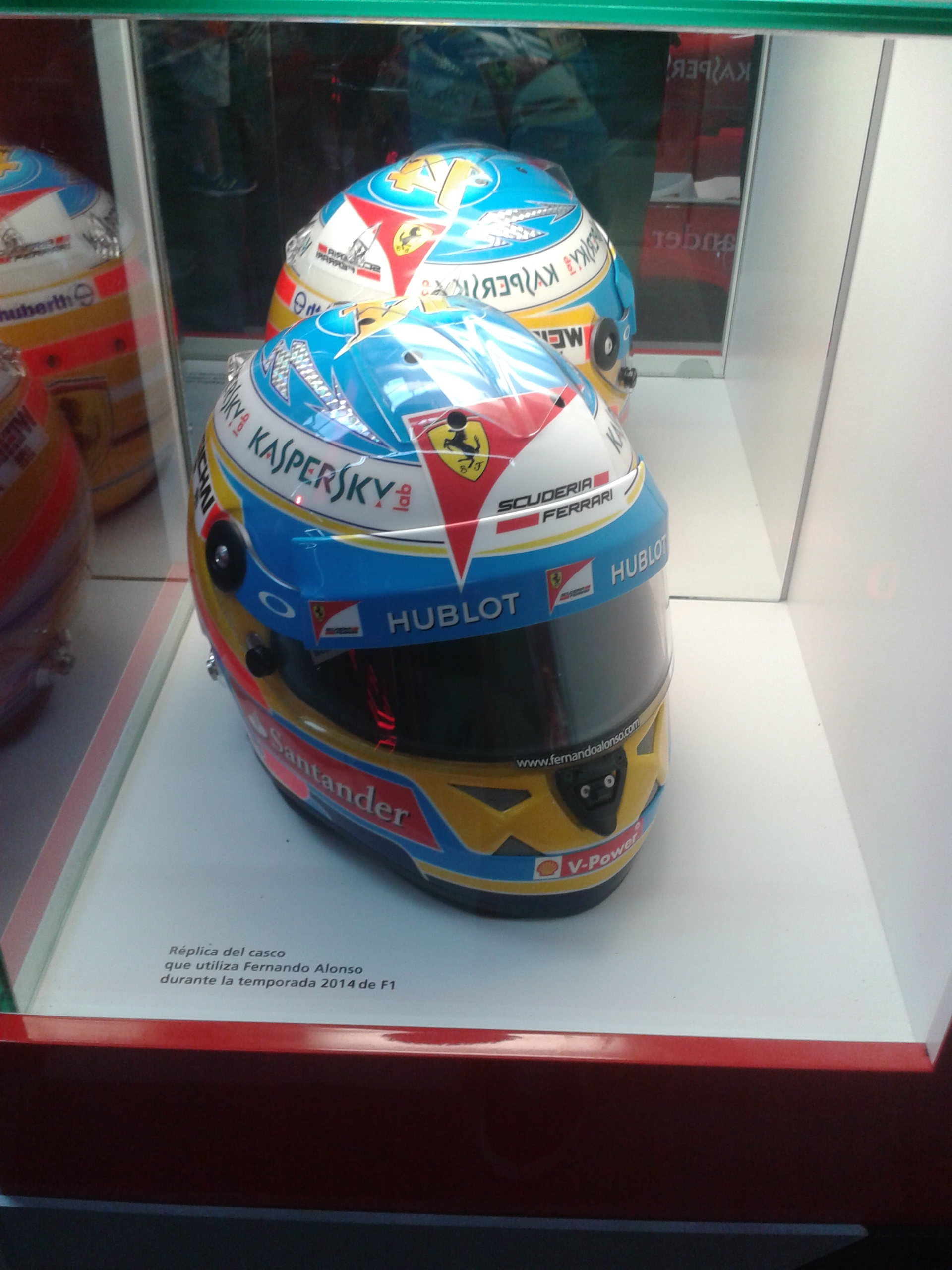 Replica del casco de Alonso en Ferrari